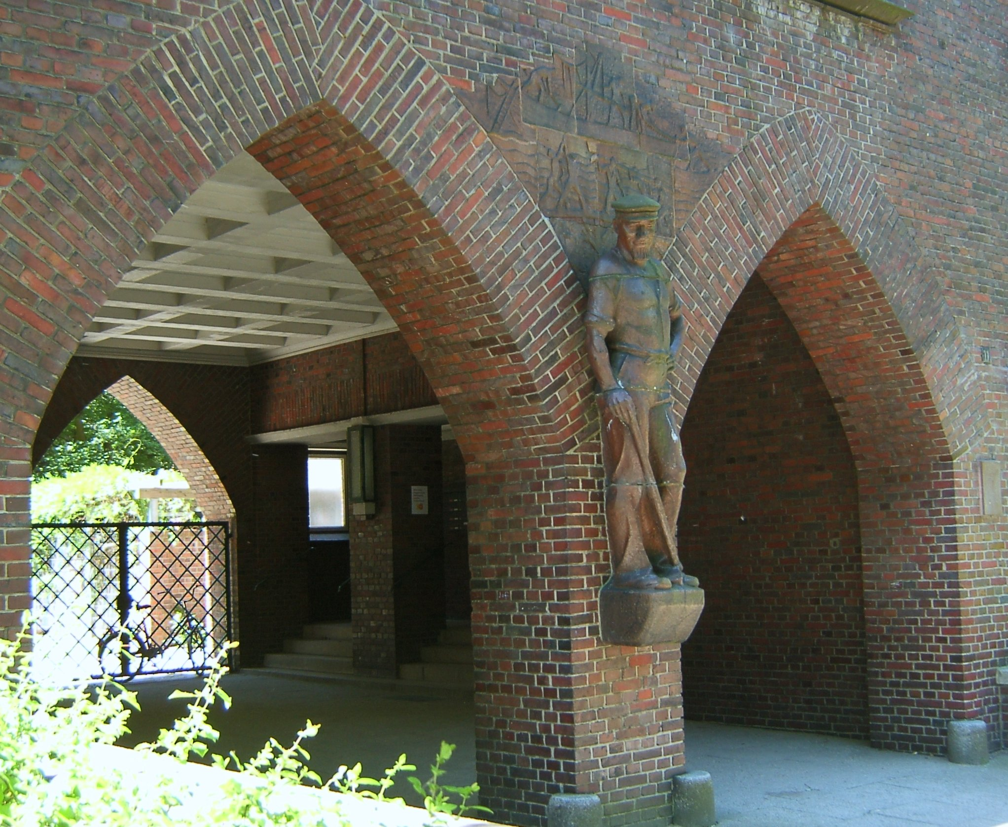 Heinrich-Groß-Hof der Allgemeinen Deutschen Schiffszimmerergenossenschaft, erbaut 1928, im Pinelsweg in Barmbek-Süd. This is the photograph of an architectural monument. It is part of the list of cultural monuments of Hamburg, no. 772